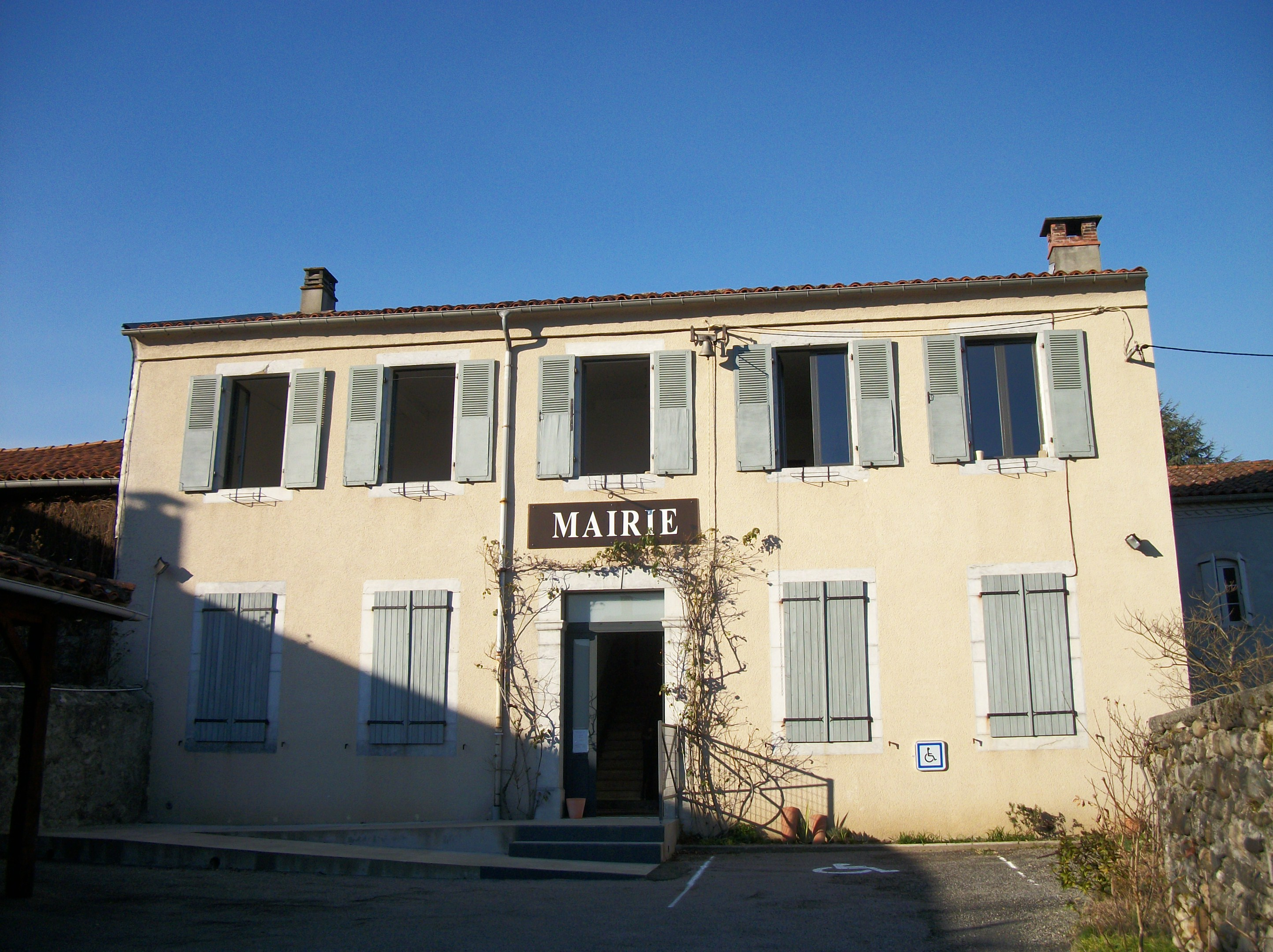 La mairie